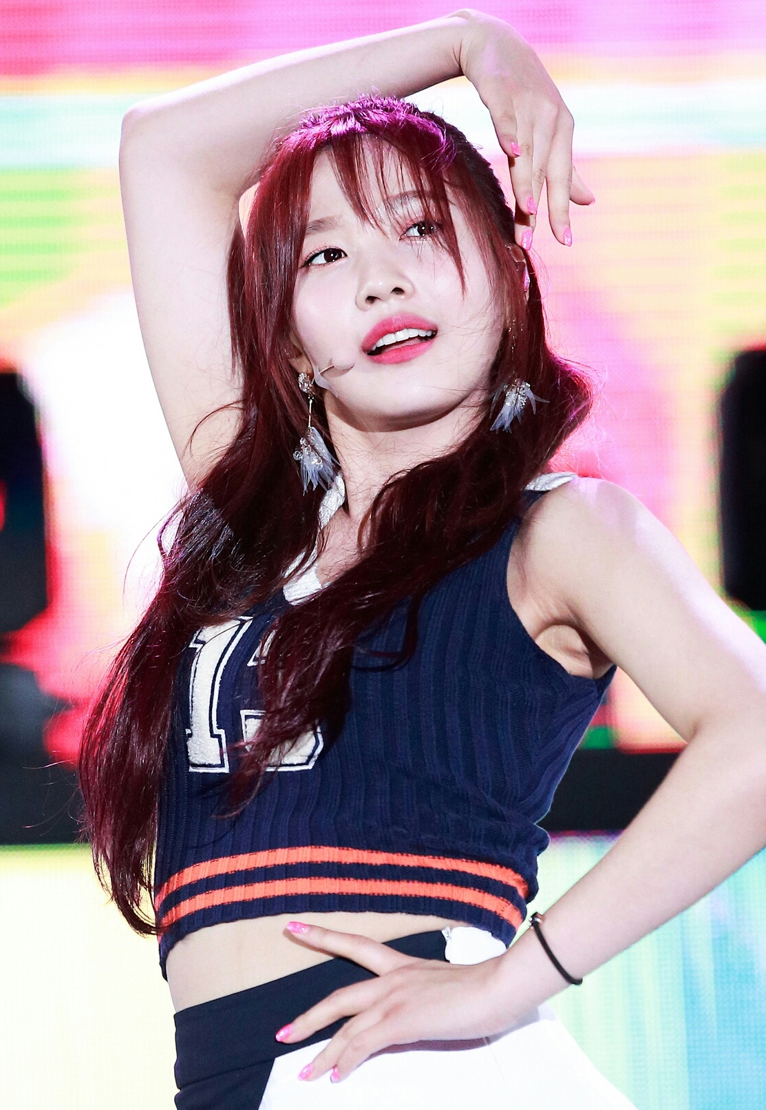 Joy Park no INK Concert em 1 de setembro de 2018